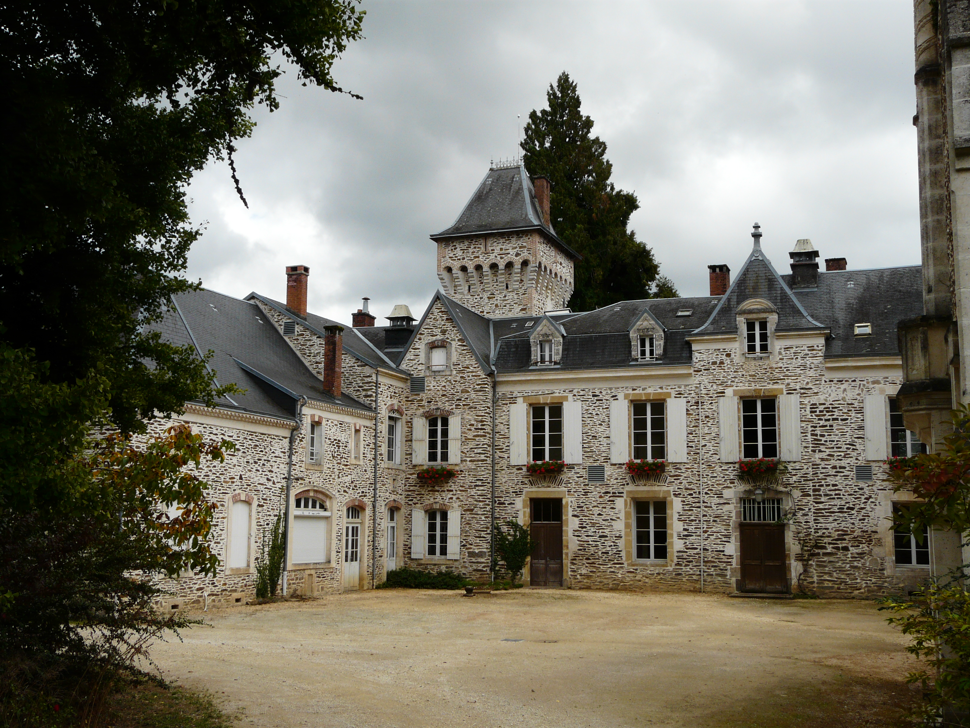 La cour intérieure du château d'Oche vue depuis l'ouest, Saint-Priest-les-Fougères, Dordogne, France